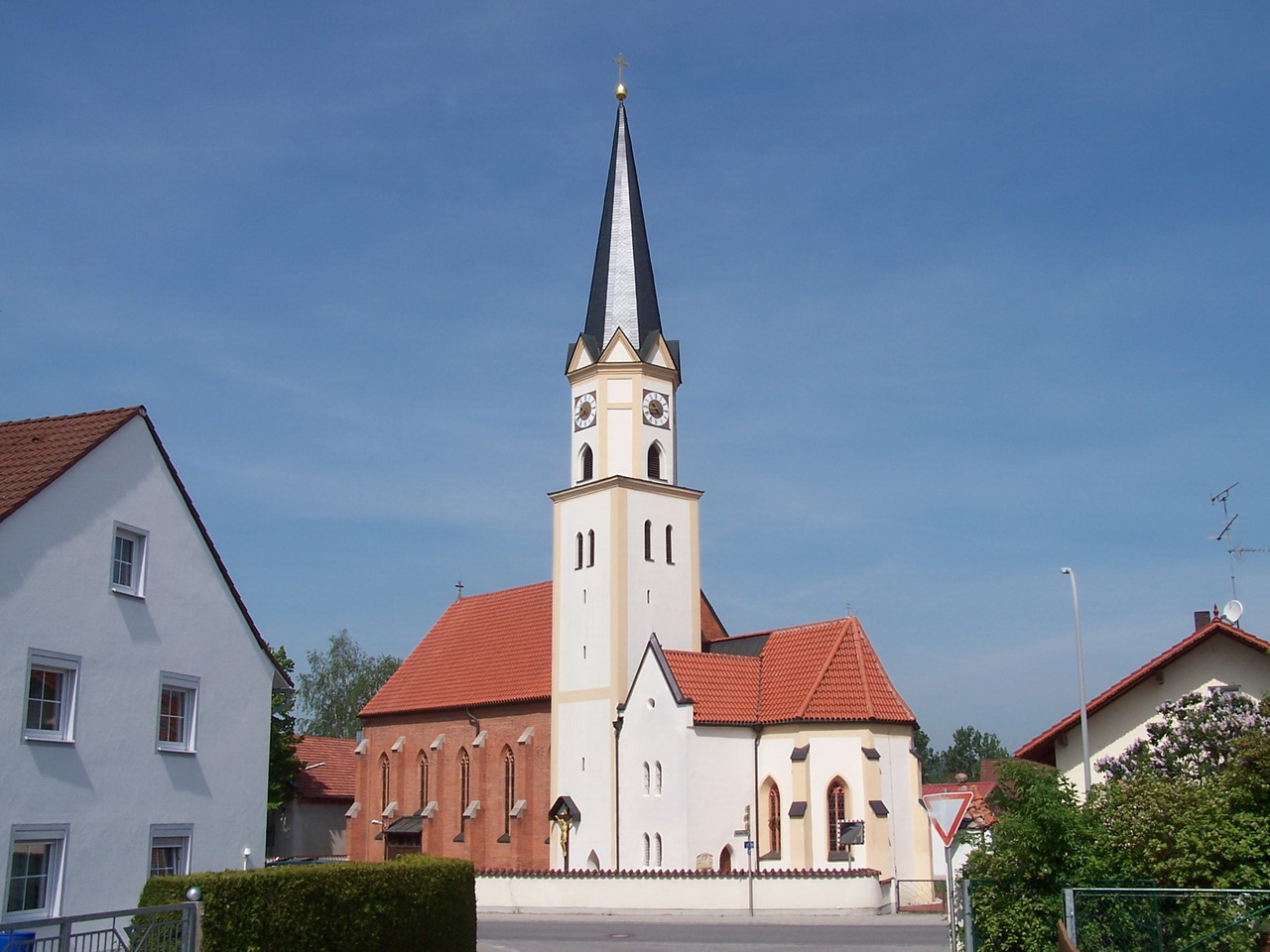 Kirche Mariä Himmelfahrt Hüttenkofen, Gemeinde Mengkofen. Die Kirche wurde 1852 neu erbaut. Der Turmunterbau stammt aus der Zeit um 1400.